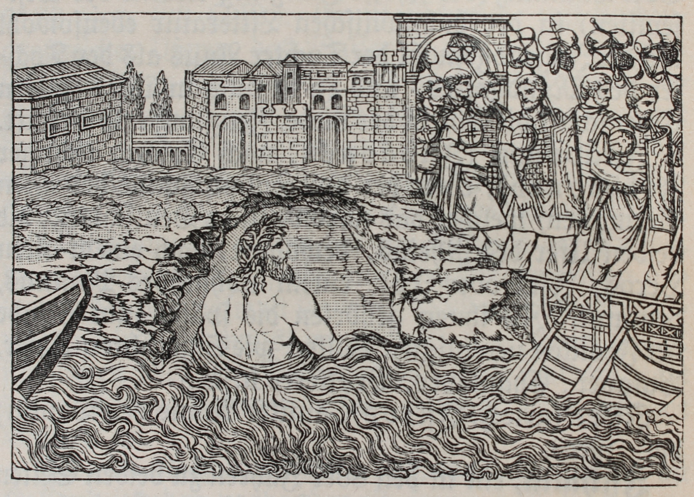 Istros; grafische Nachempfindung des Reliefs der Trajansäule